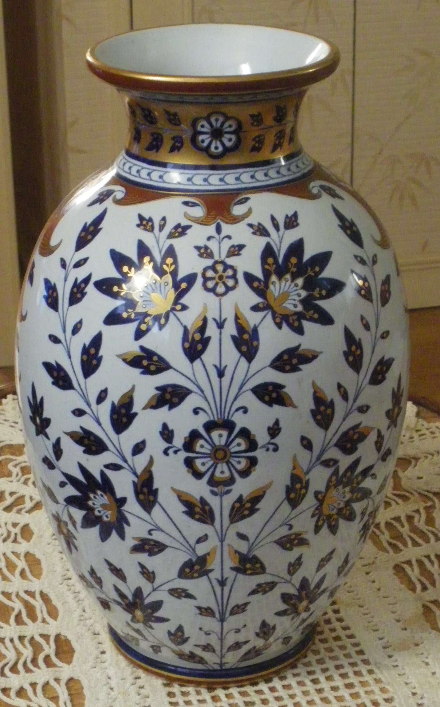 Vase en faience de Sarreguemines